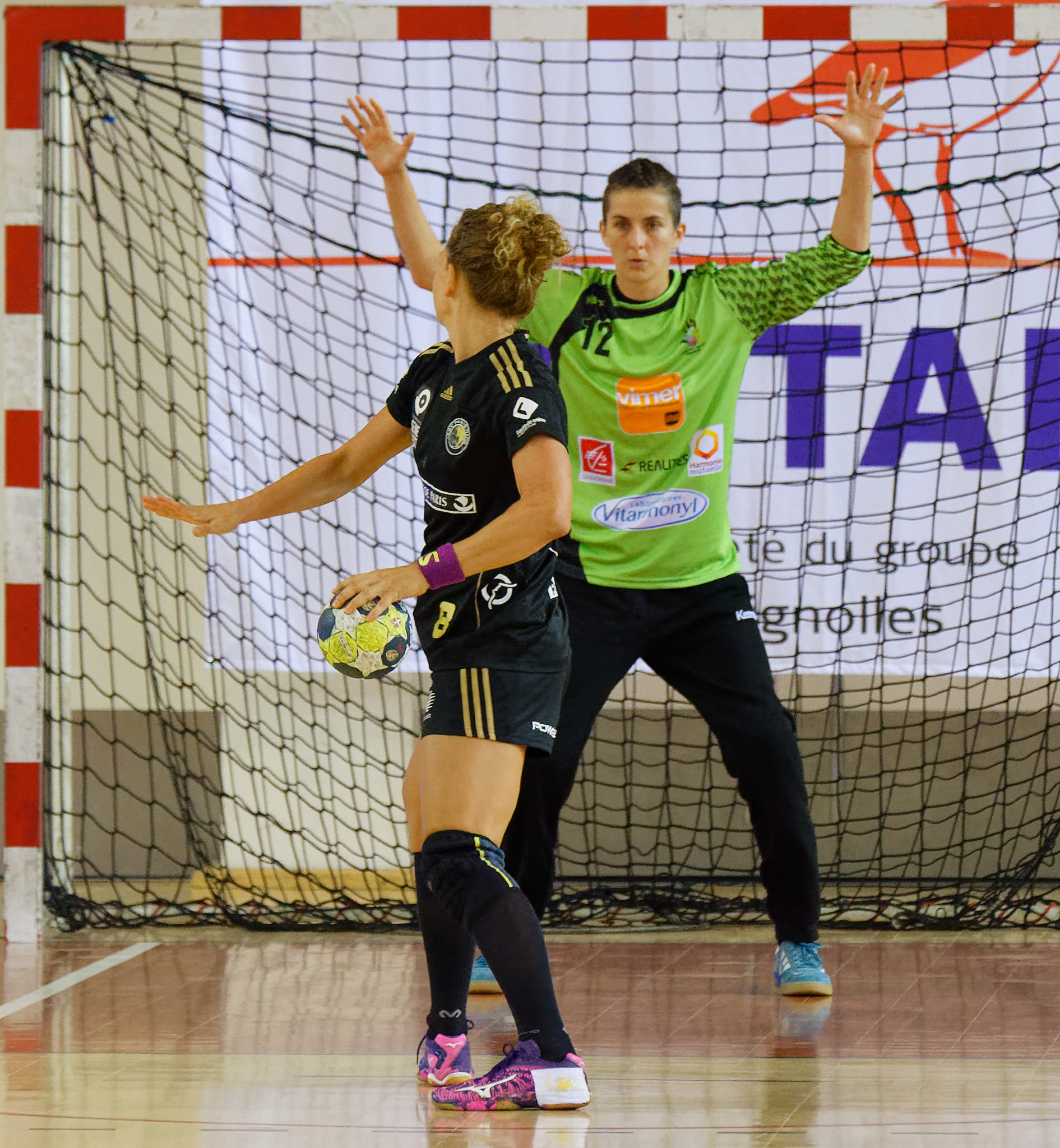 Gervaise Pierson, lors de Issy Paris / Nantes LAHB. Le 14 septembre 2016 à Issy Les Moulineaux.